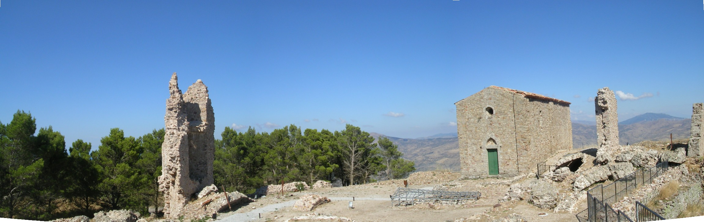 Cappella palatina (chiesa di Sant' Anna) e ruderi del castello